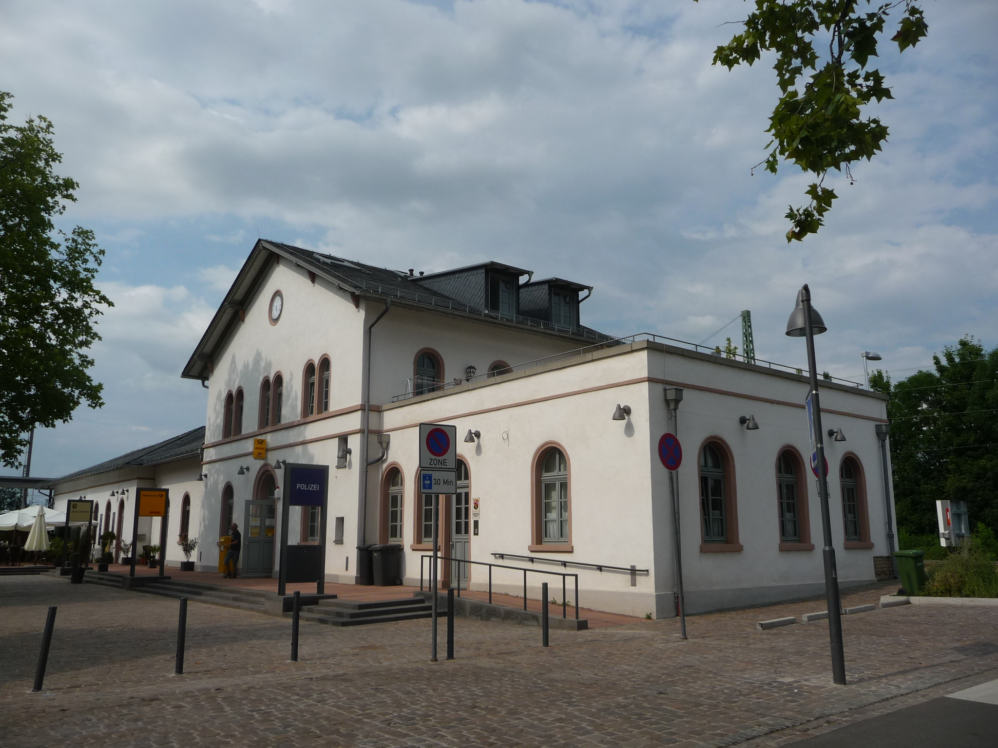 Osthofen ist eine Stadt im so genannten Wonnegau im rheinland-pfälzischen Landkreis Alzey-Worms.